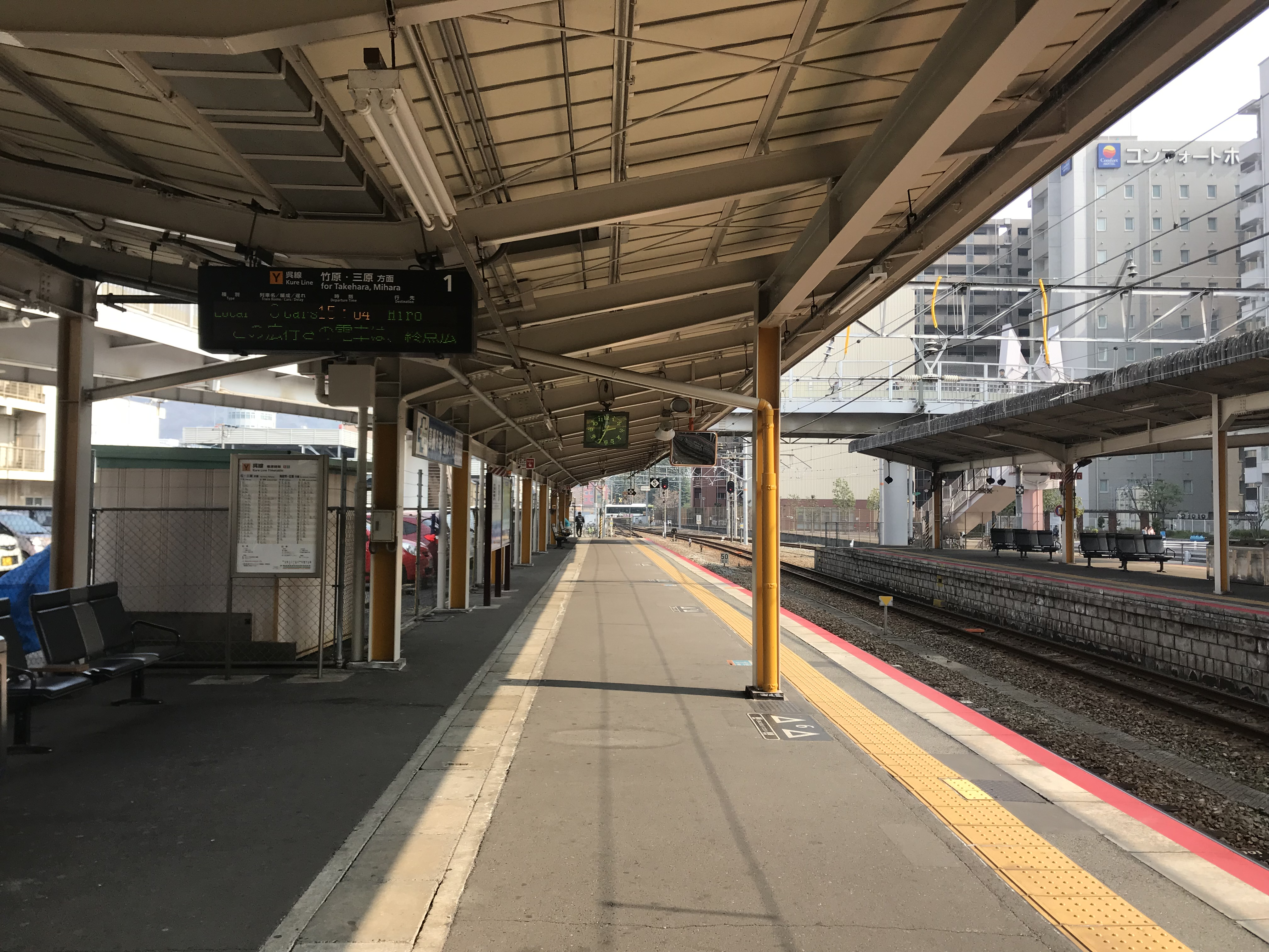 呉駅のホーム(奥は安芸阿賀方面)